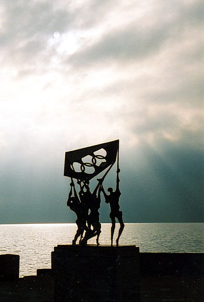 Lausanne-Ouchy, Musée Olympique: Skulptur am Genfersee